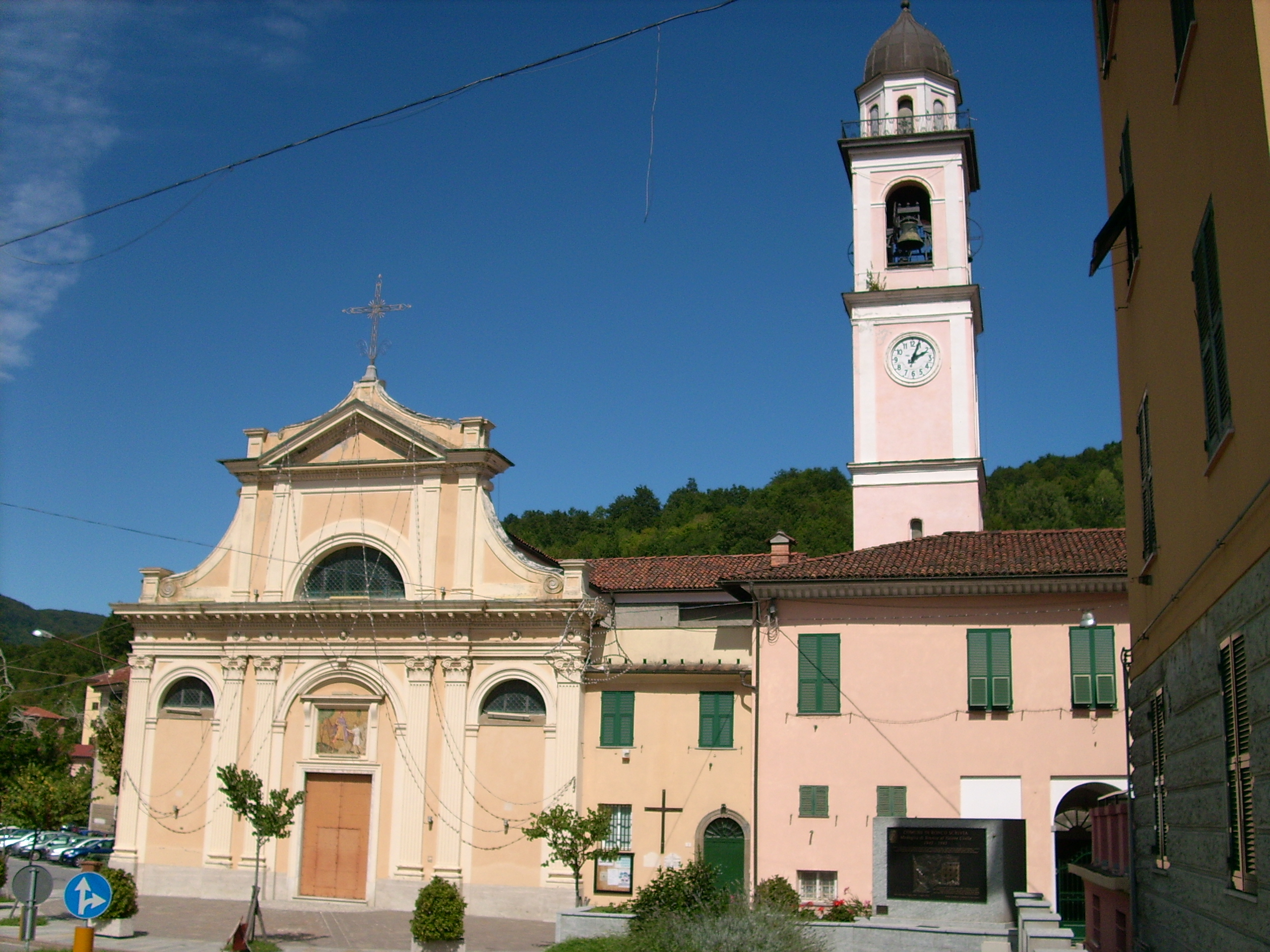 Chiesa di san Martino di Ronco Scrivia, Liguria, Italia